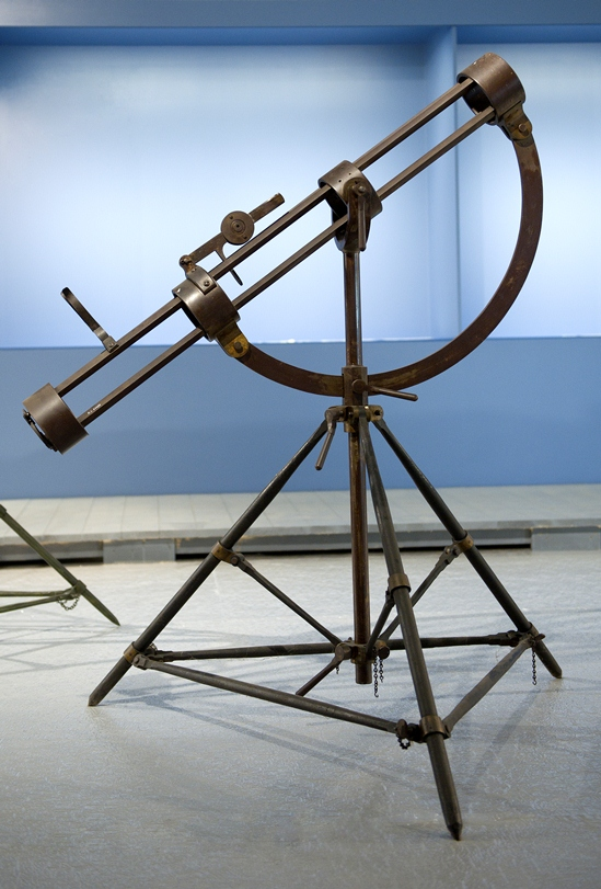 24 pfündiges (9,5cm) Rotationsraketengeschütz System Hale mit Dreibeinlafette im Heeresgeschichtlichen Museum